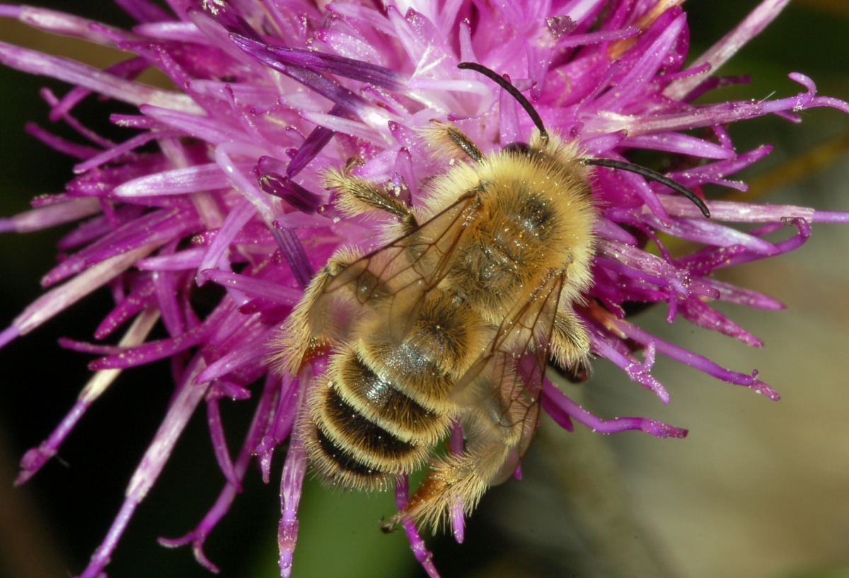 Dasypoda hirtipes, Männchen, Eberstädter Düne, Darmstadt, Hessen, Deutschland